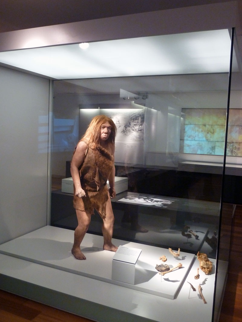 Oviedo